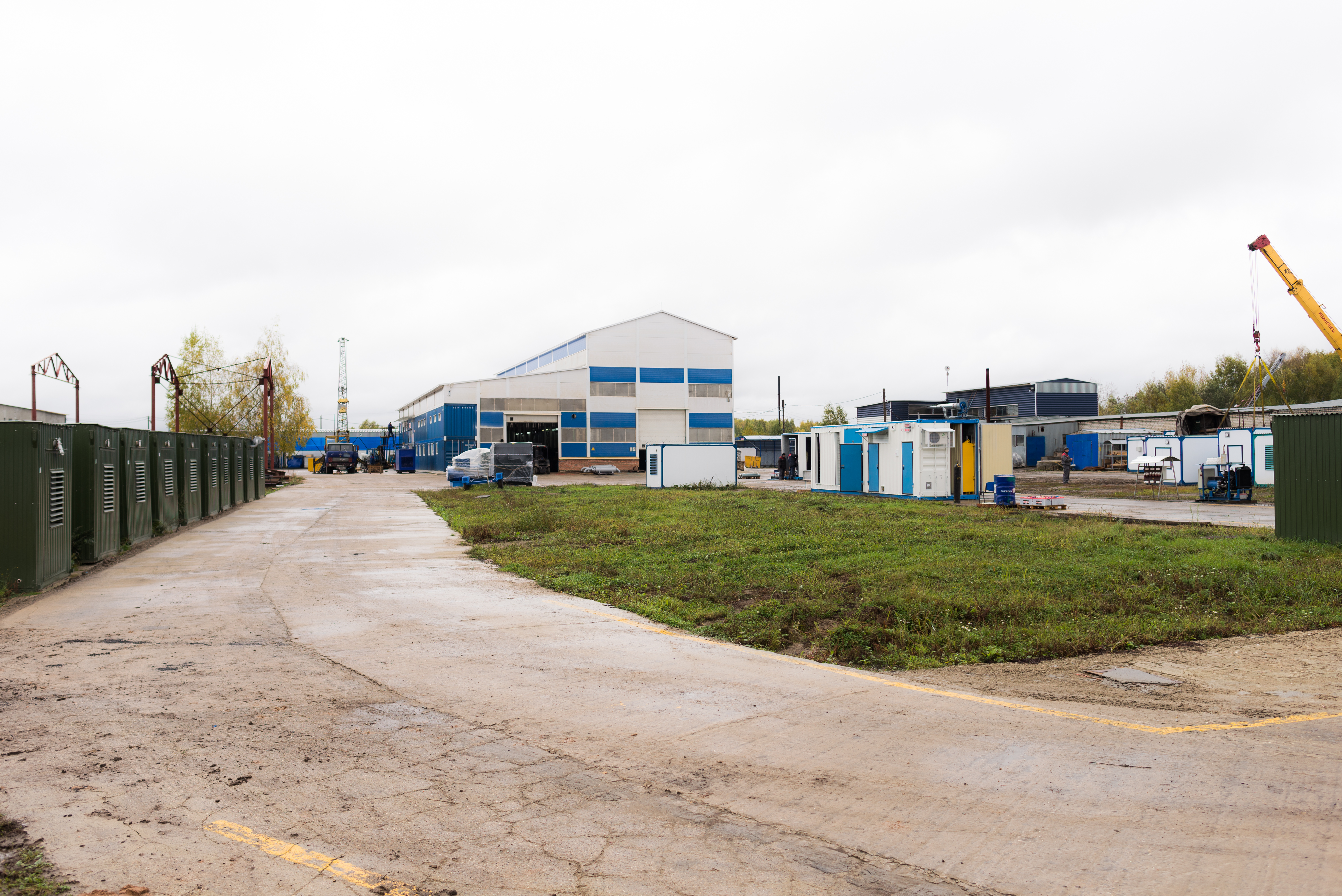 деревня Красный Бор, Ярославская область